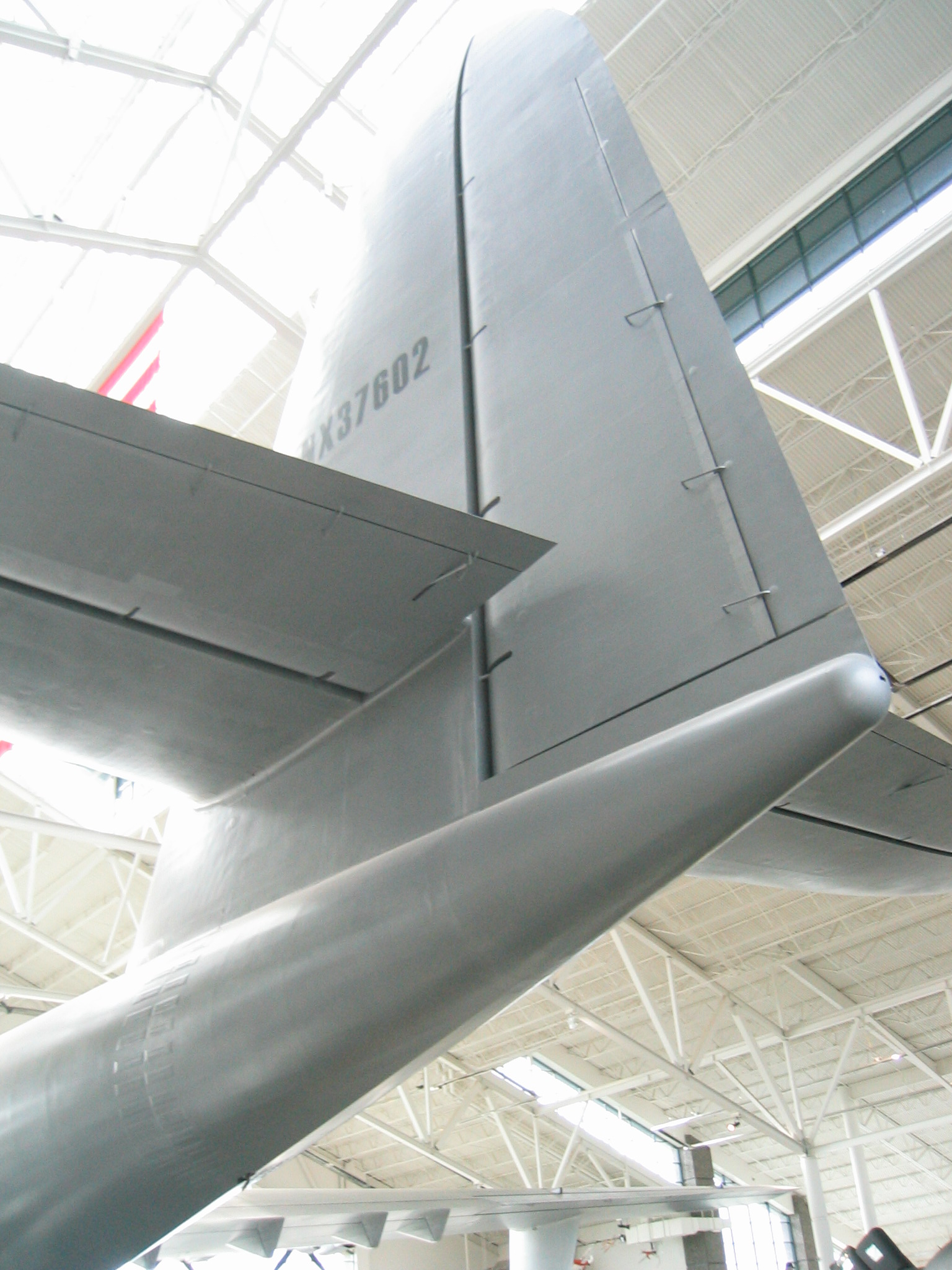 Die stertgedeelte van die HK-1 by die Evergreen Lugvaartmuseum.